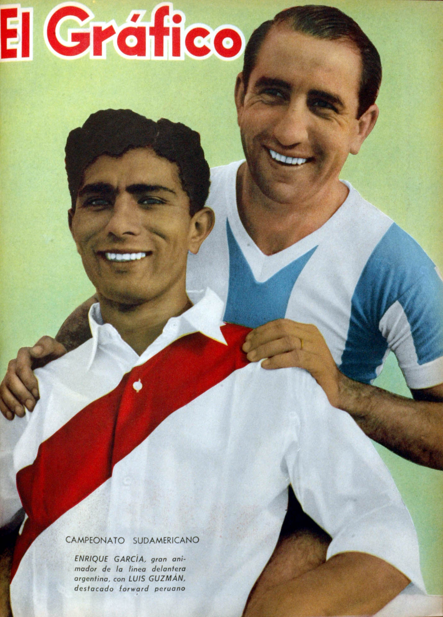 El Grafico del 30 de Enero de 1942. Edicion 1177